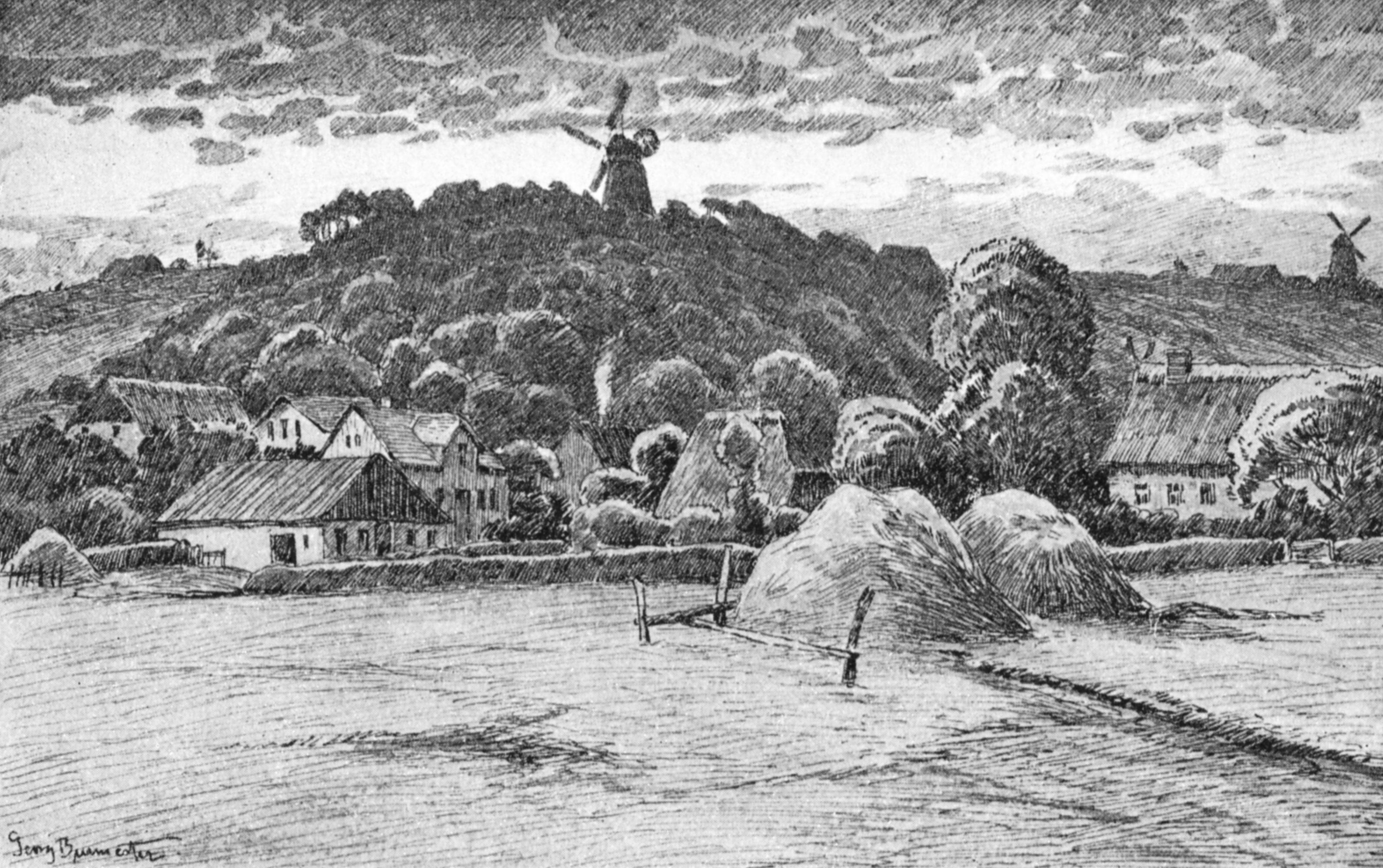 Burg in Dithmarschen um 1895, Zeichnung von Georg Burmester